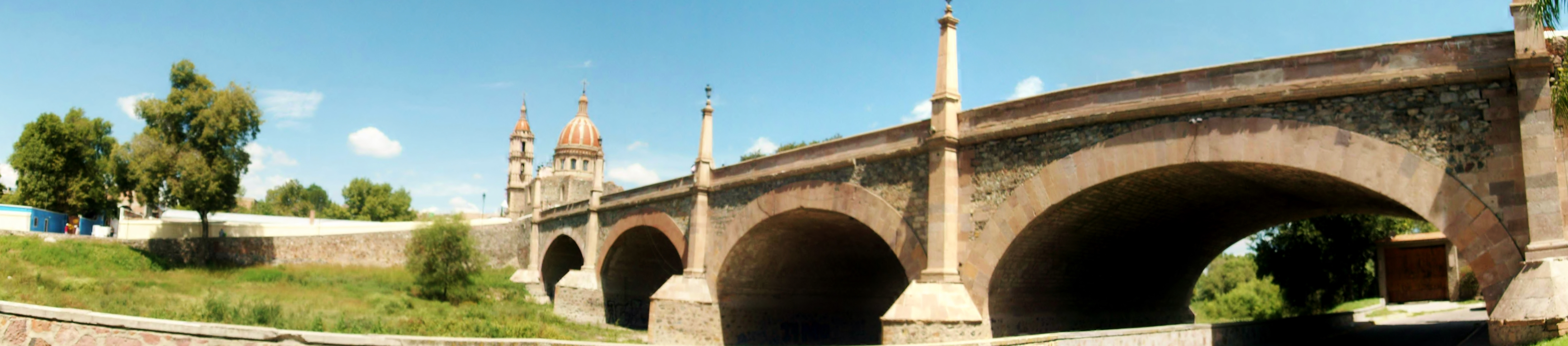 Lagos de Moreno, Jalisco, México.